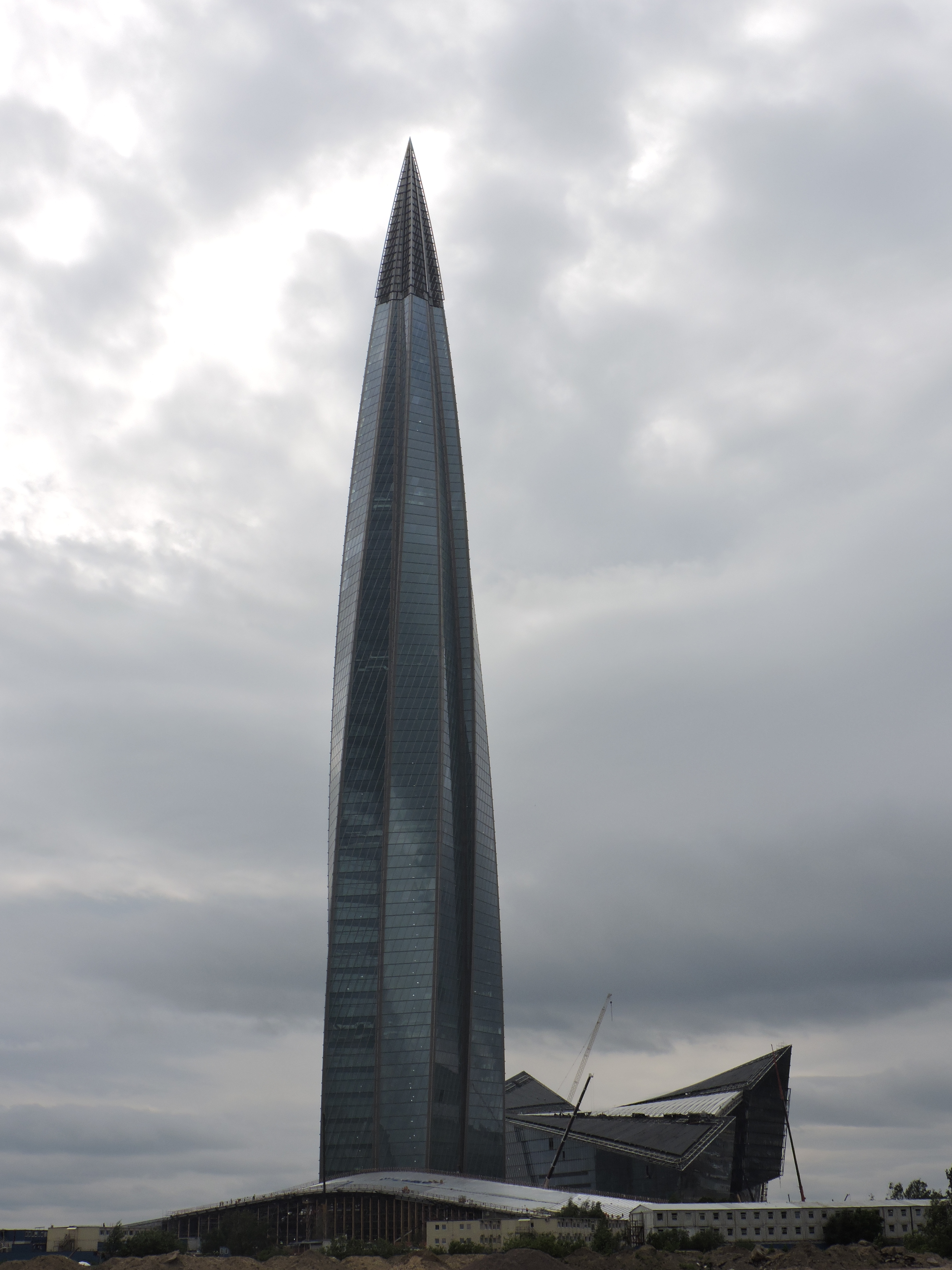 Лахта-центр